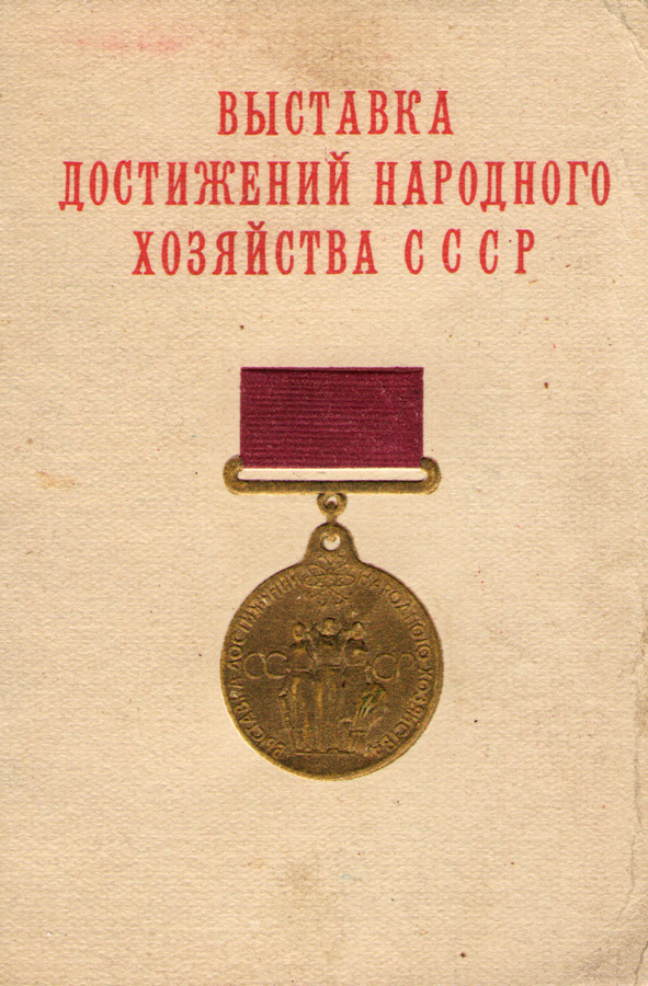 удостоверение о награждении золотой медалью Комитетом совета ВДНХ